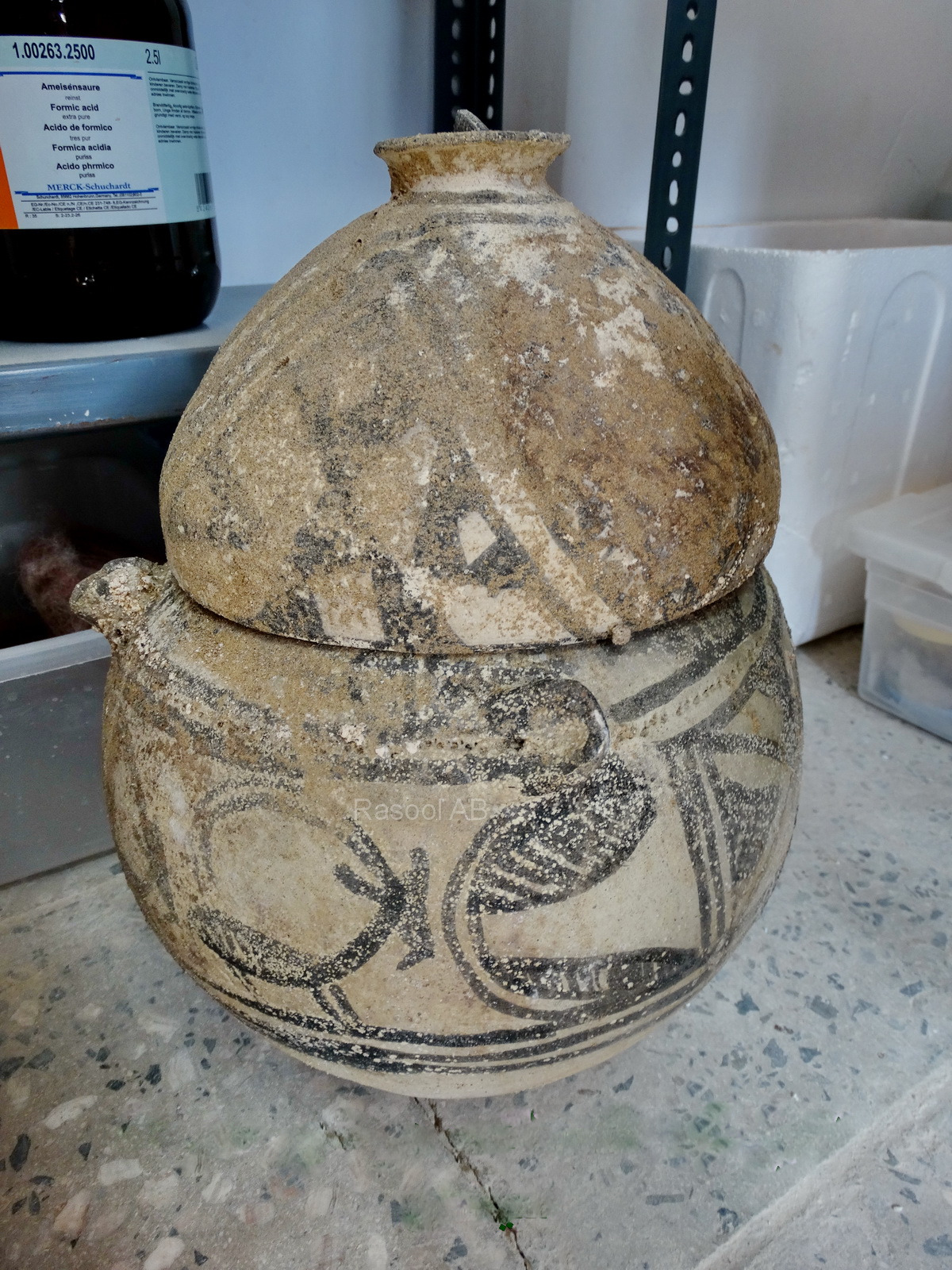 خمیرگیر5000ساله در شهر سوخته